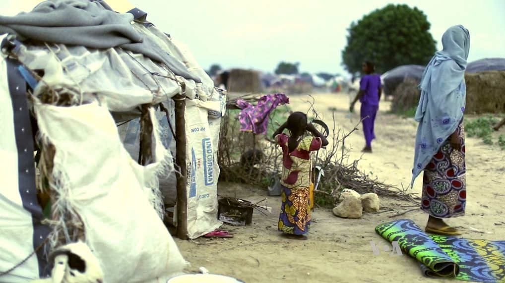 Réfugiés nigérians à Maiduguri en août 2016.